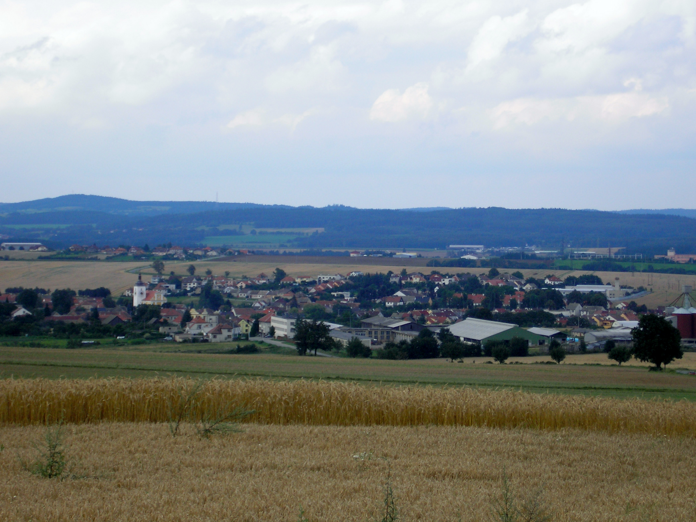 Stařeč od jihu